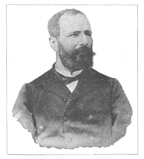 Retrato de Fernando Lozano «Demófilo», publicada en la revista satírica española Don Quijote.